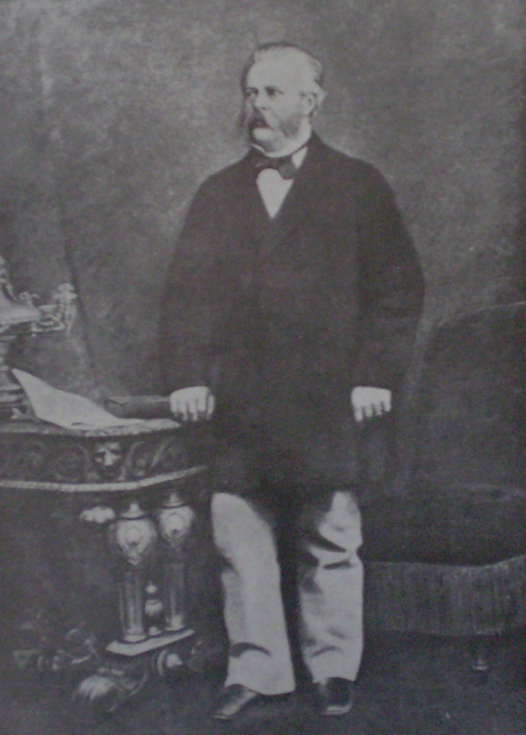 Ovidio Lagos. Óleo de G. Cantalamessa